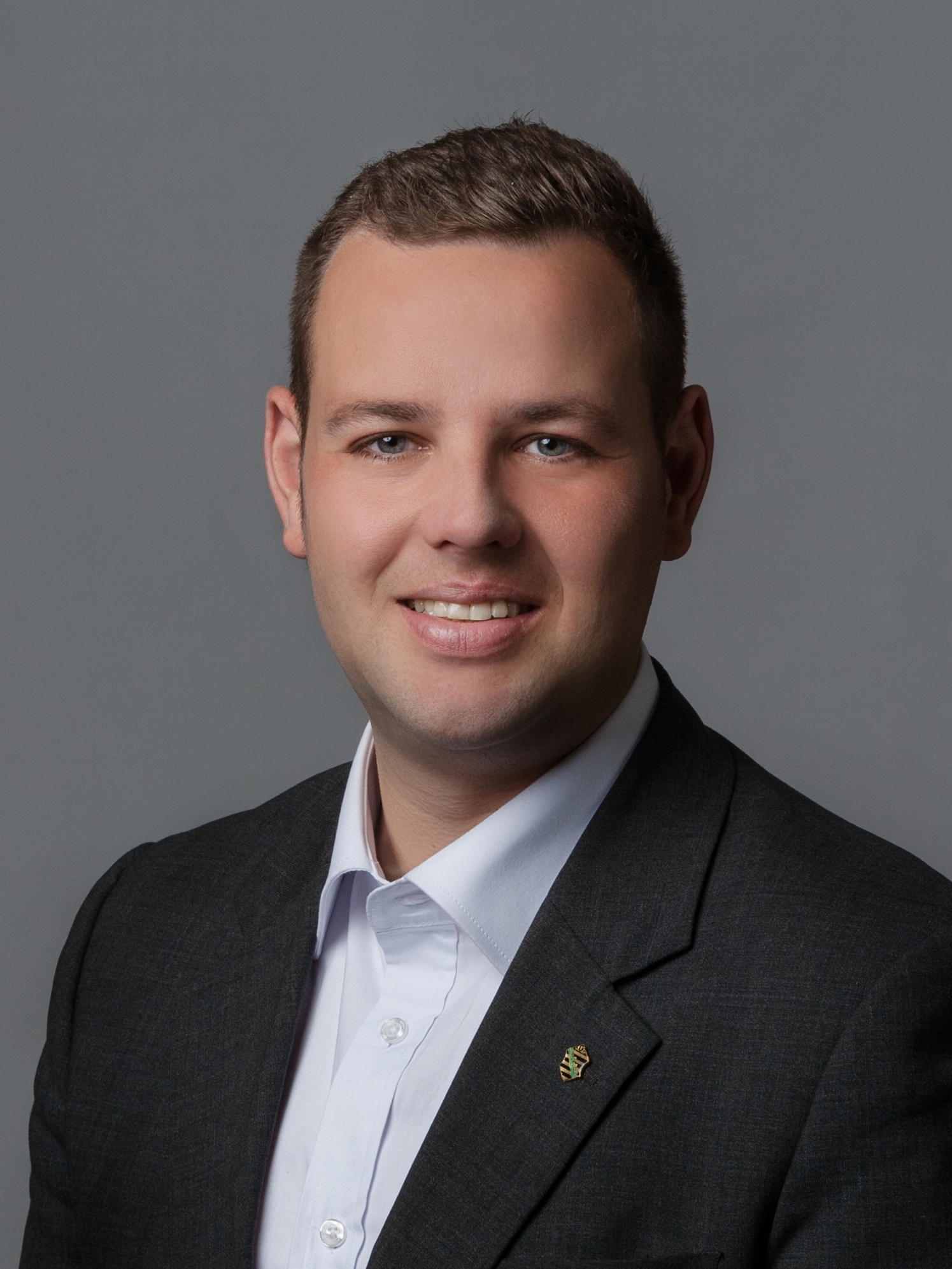 Abgeordneter des Sächsischen Landtages Sebastian Fischer - Hochformat